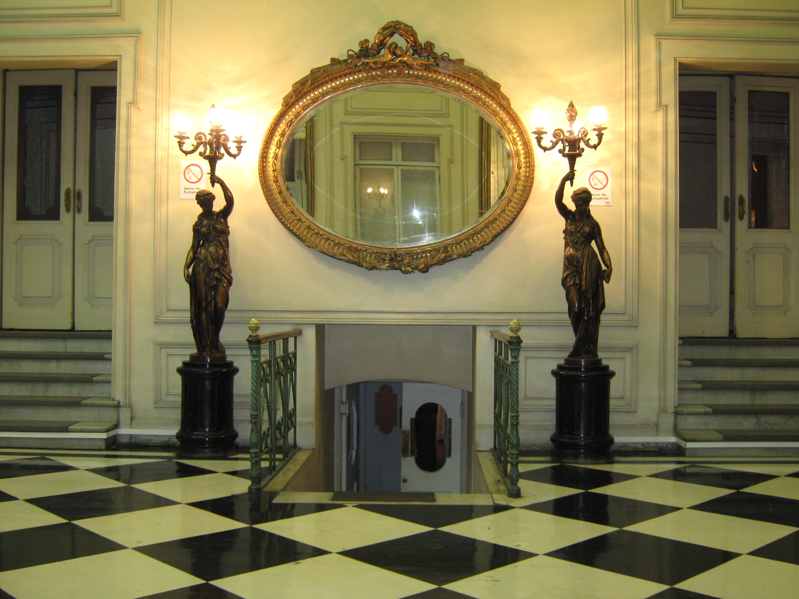 Teatro Municipal de Santiago: El mejor lugar para la cultura y las artes. This is a photo of a national monument in Chile: 208